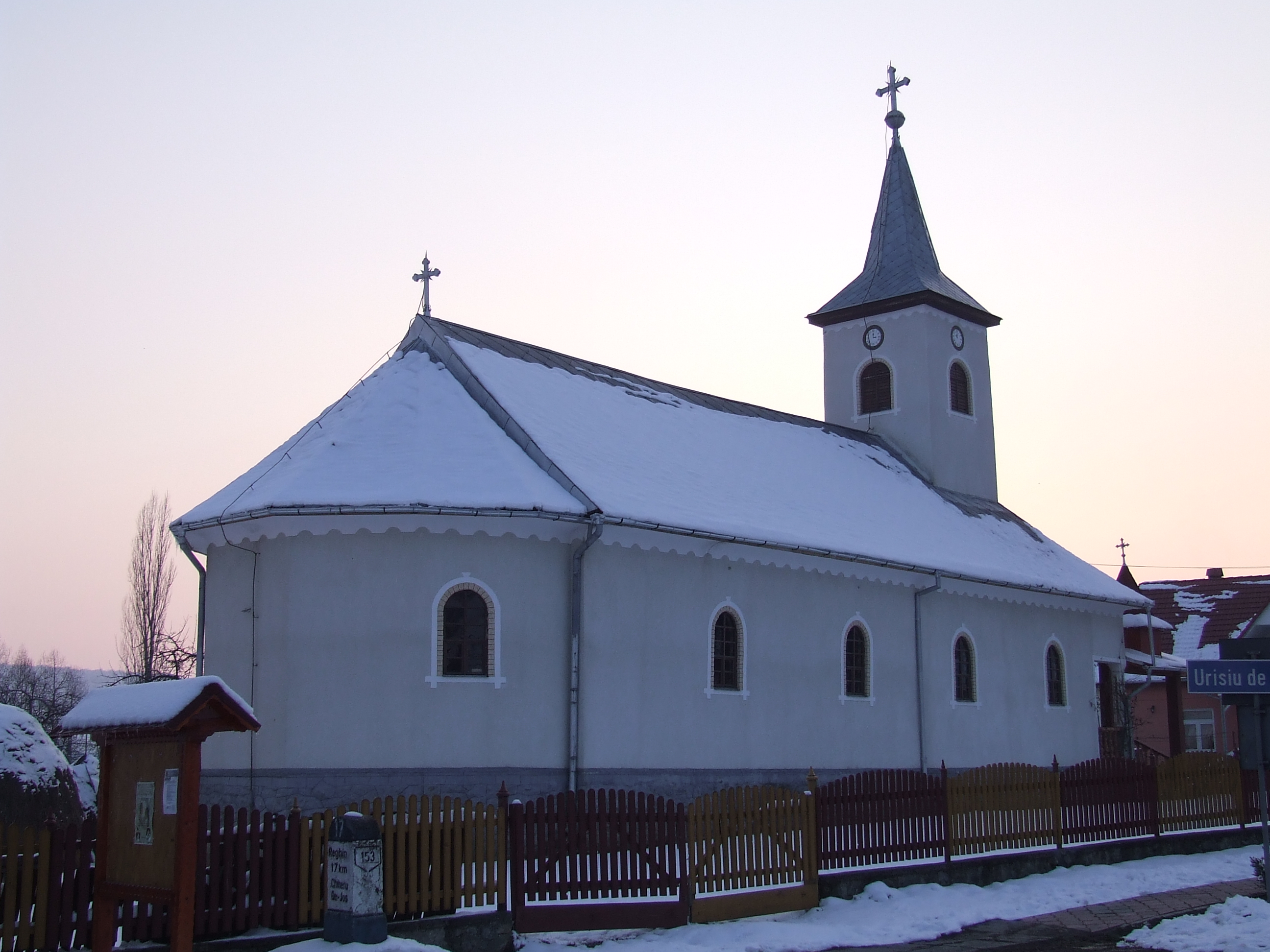 Biserica de lemn din Chiheriu de Jos, judeţul Mureş.